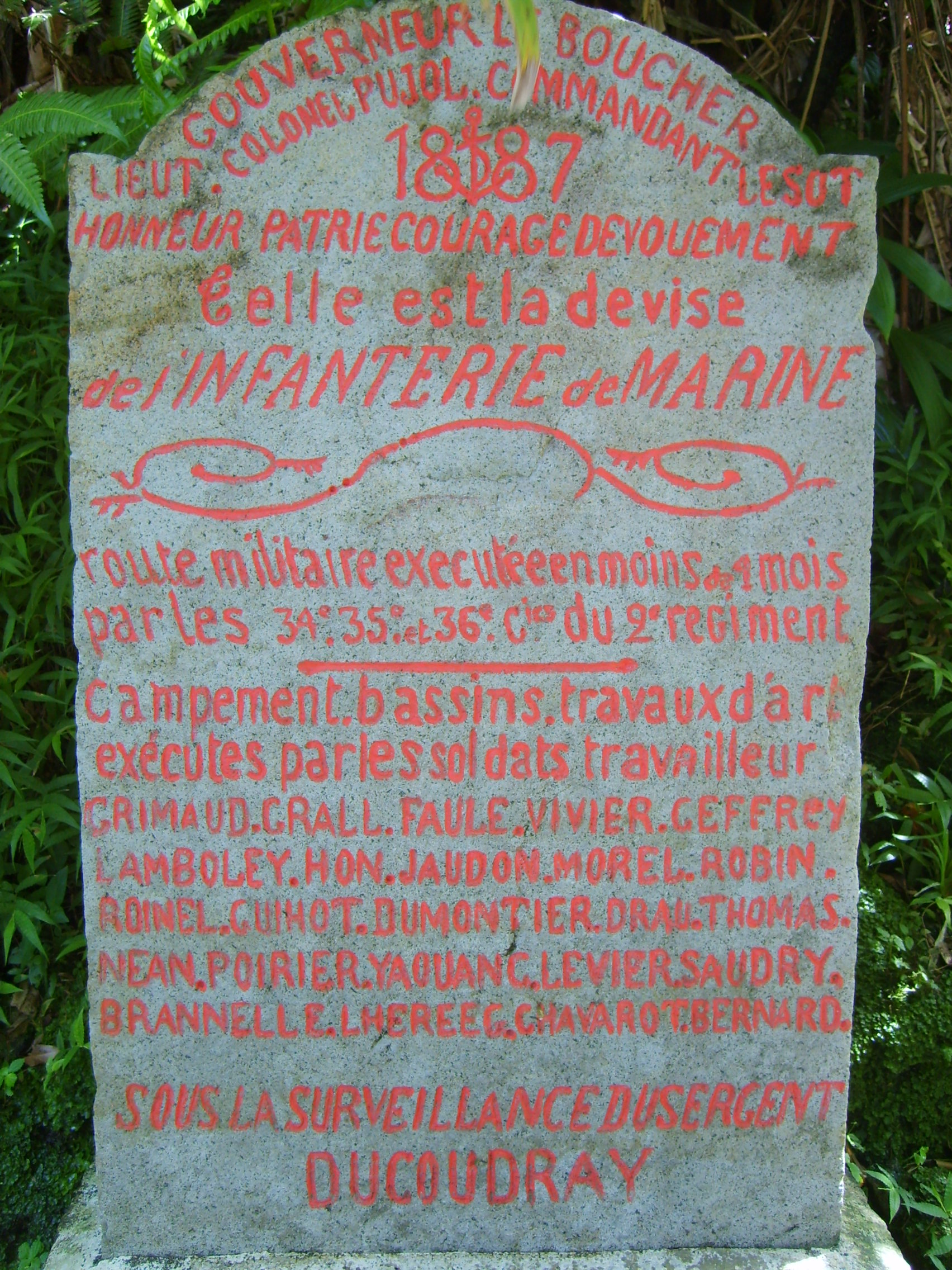 Stèle de pierre se trouvant sur la voie de la Soufrière, témoignant du travail du 2ème Régiment d'infanterie de marine pour l'aménagement d'un bassin, pour les soldats malades de la dysenterie, typhoïde ou fièvre jaune.